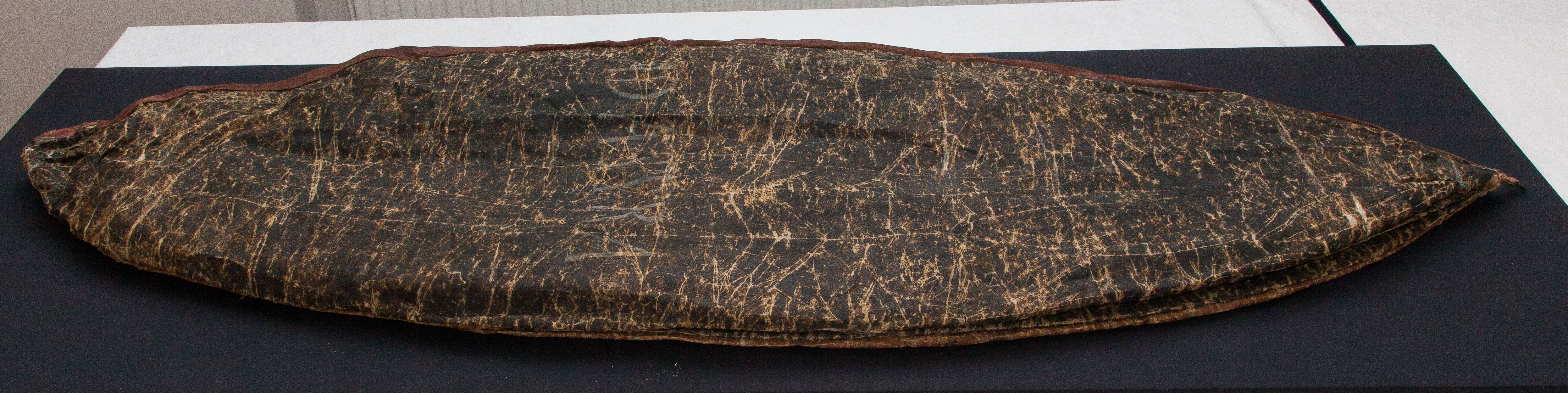 Ad AStra: Seitenansicht der Hülle des Ballons von 1784. Die Hülle befindet sich heute im Städtischen Museum Braunschweig (SMBS)